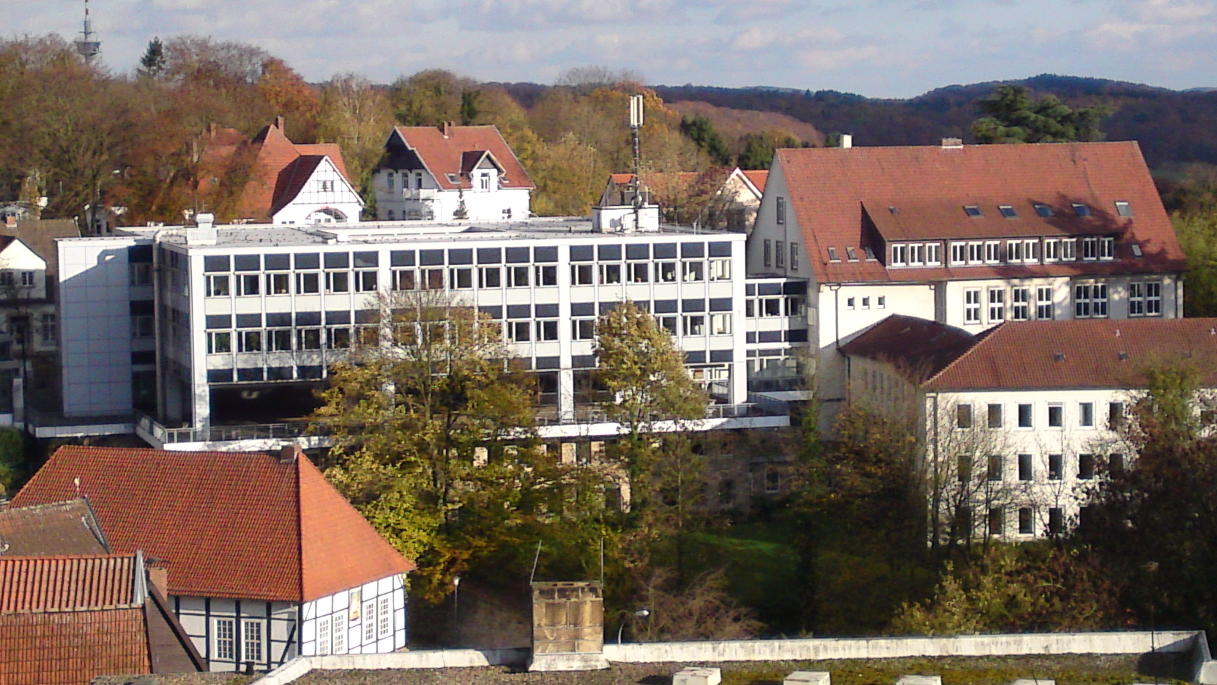 Kreishaus Tecklenburg